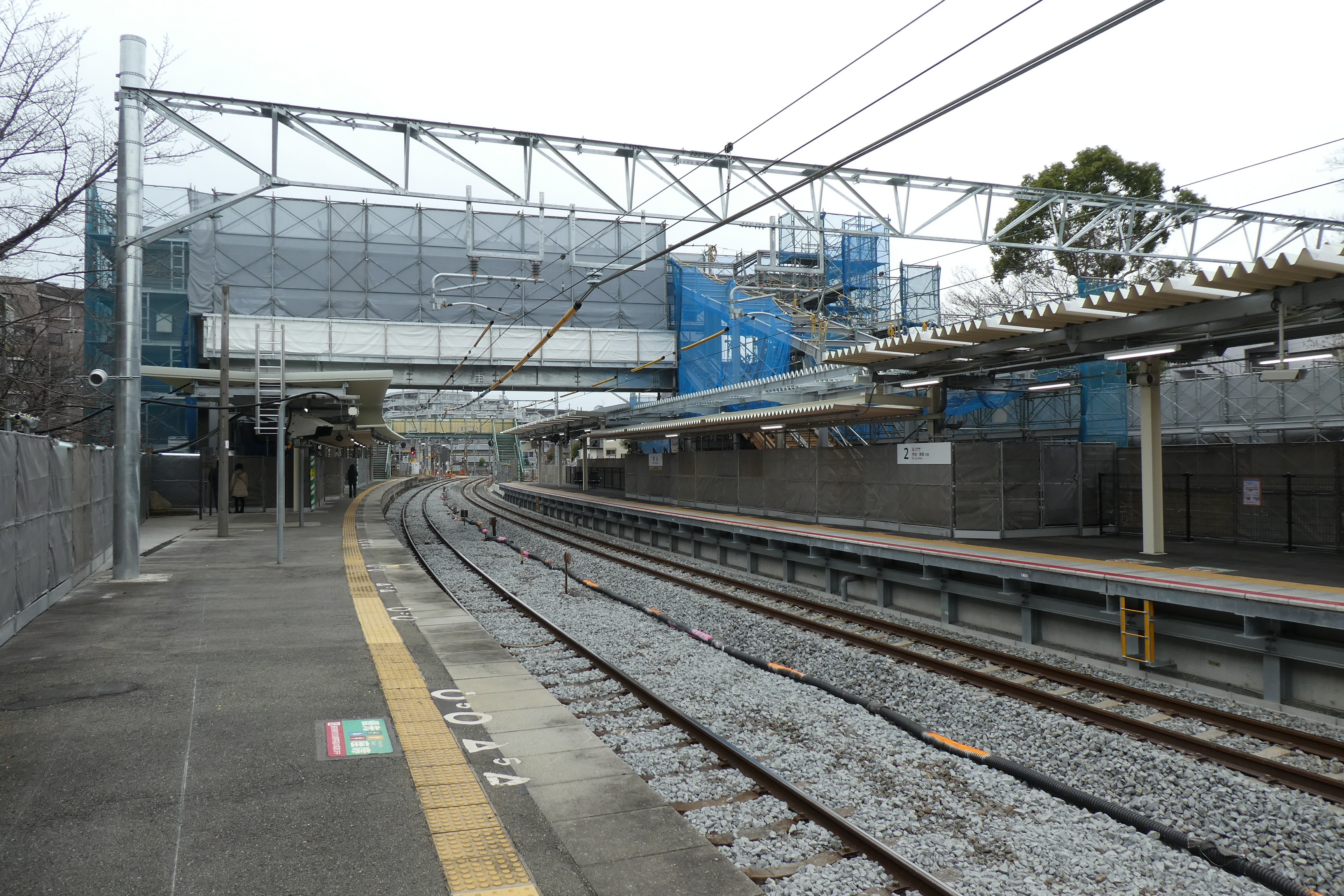 JR奈良線桃山駅。バリアフリー化工事中。1番のりばホーム上から撮影。